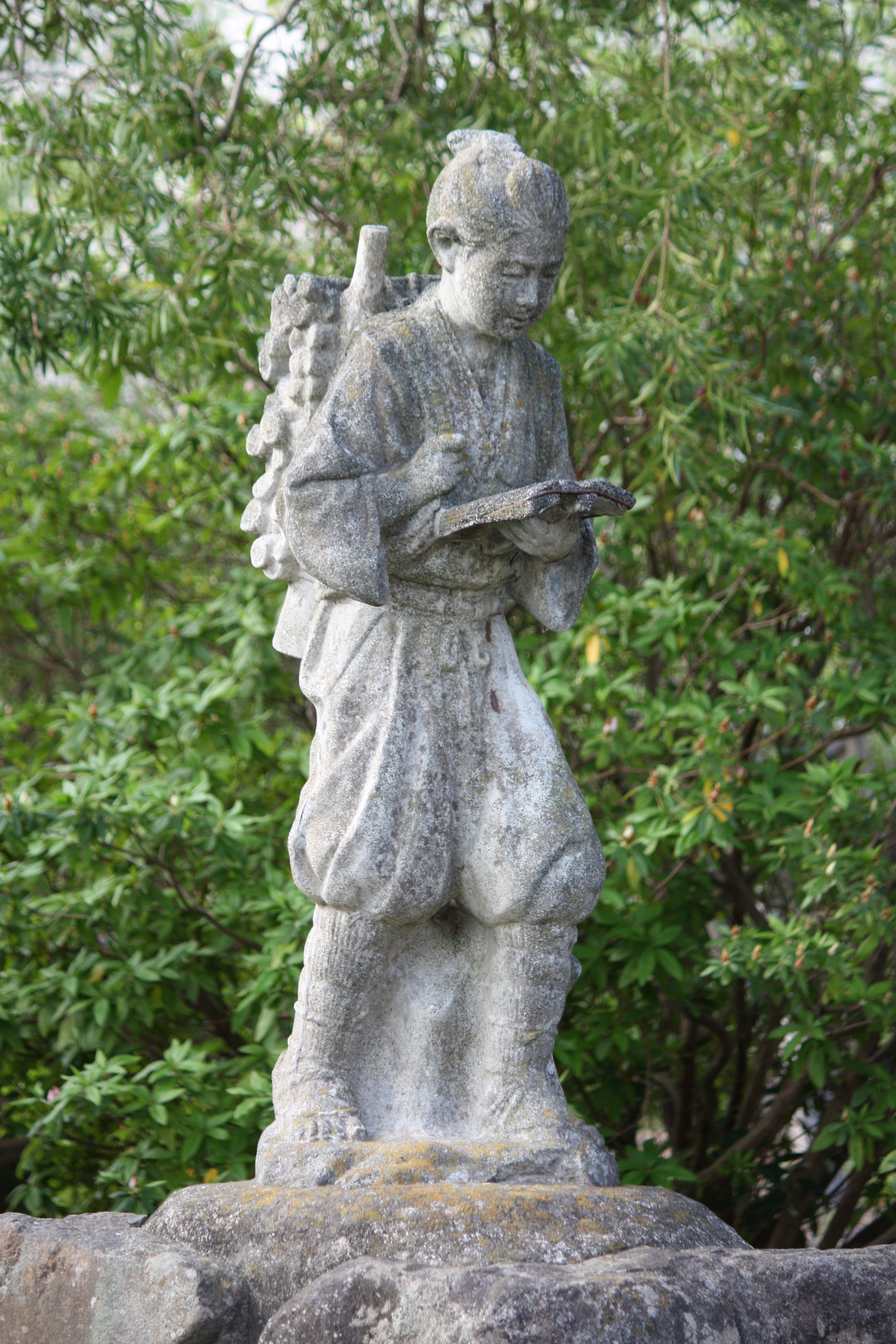 鹿児島県霧島市国分敷根の旧「敷根小学校」跡地に有るコンクリート製の二ノ宮金次郎（二ノ宮尊徳）像です。